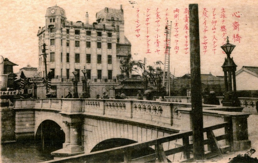 石橋時代の心斎橋。向こうのビルは石原時計店。コピー機の性能が悪く、一行が判読不能になった。